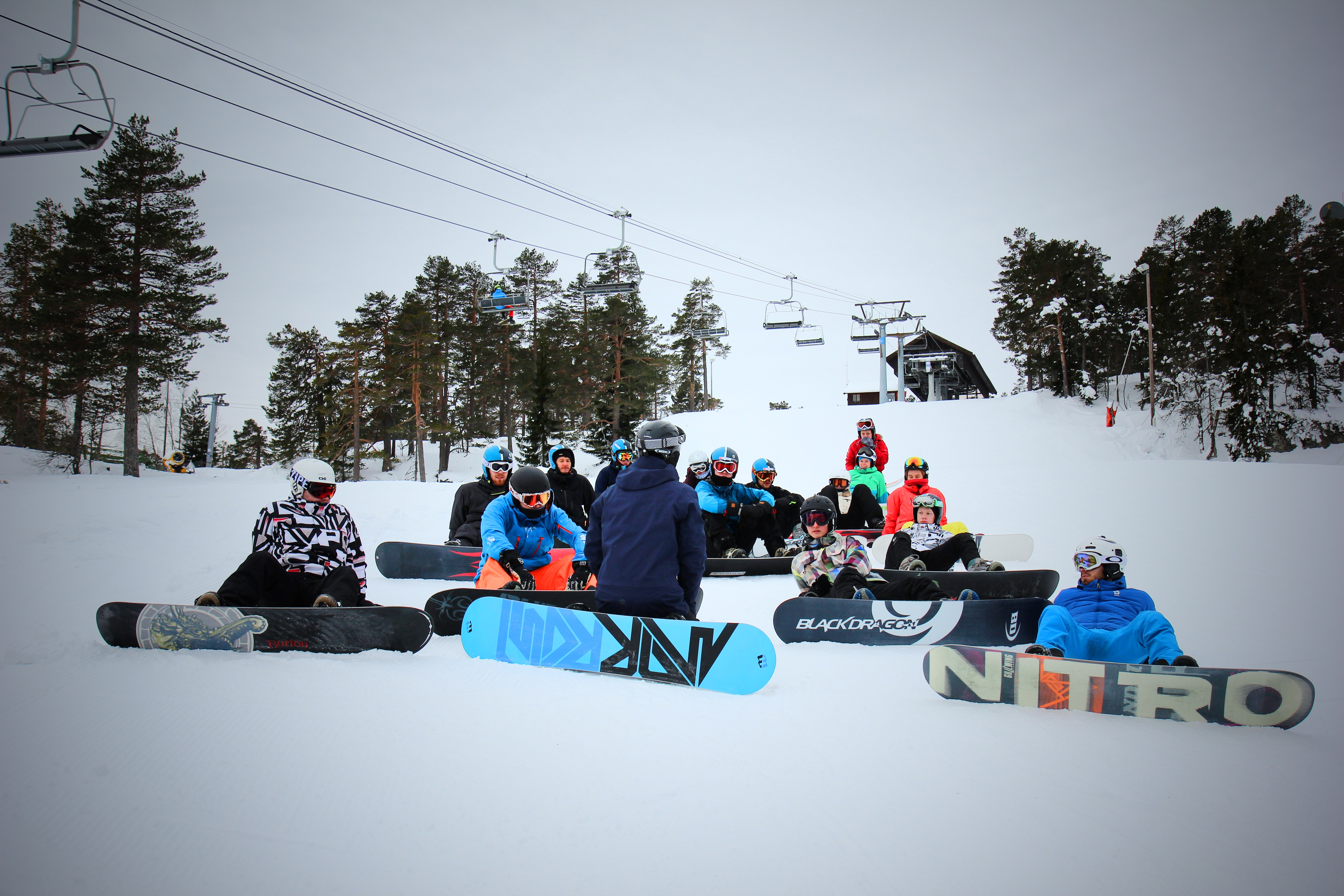 Studenter ved faglærerutdanningen i kroppsøving og idrettsfag har snøbrettundervisning.